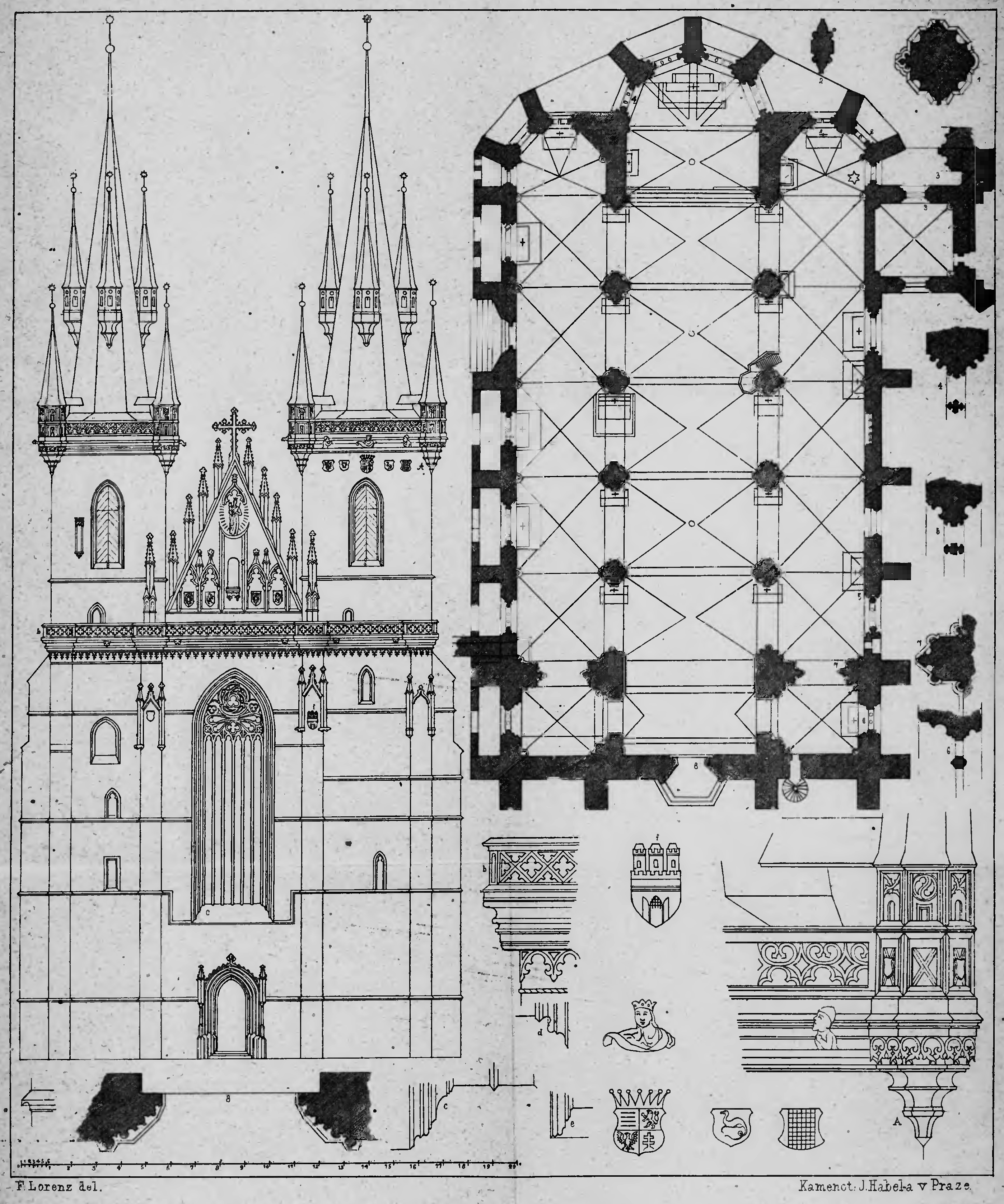 Mapa a náčrtky výzdoby Chrámu nanebevzení panny Marie před Týnem